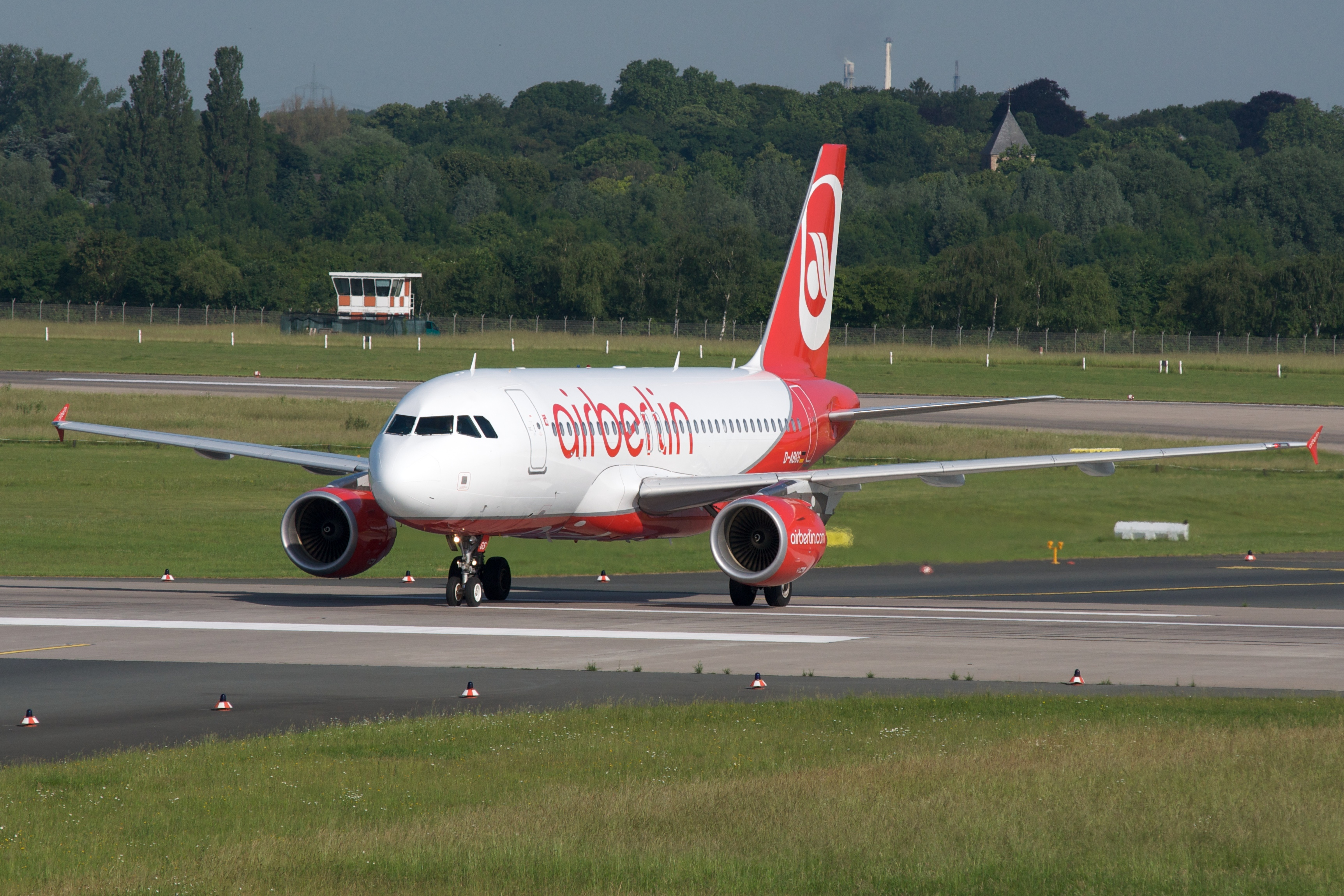 Air Berlin A319 D-ABGS at Düsseldorf Airport